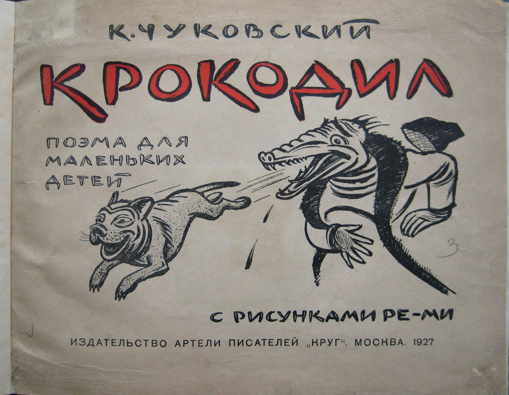 Chukovski. Cover of the book "Crocodile" 1927